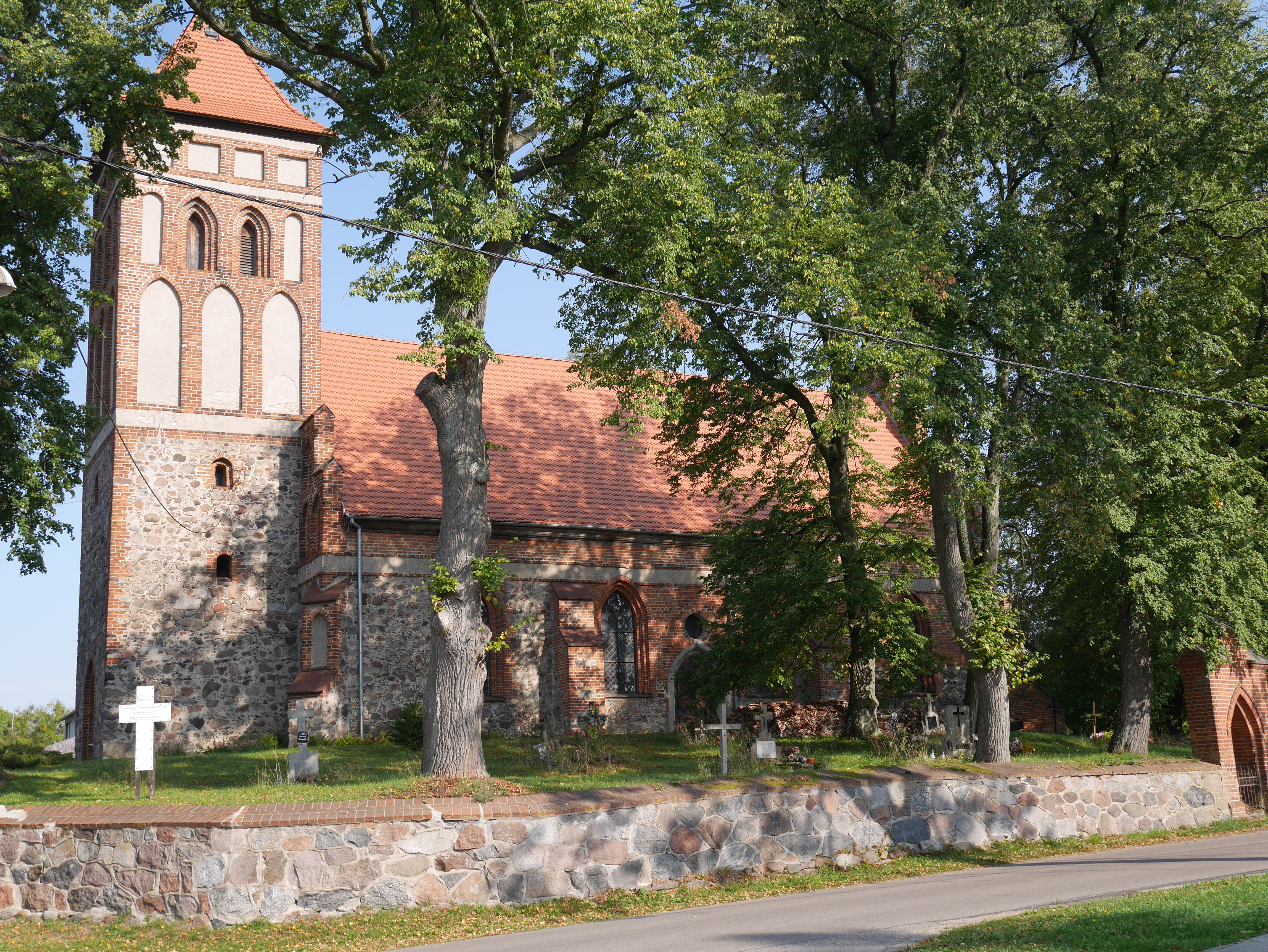 Boreczno - rzymskokatolicki kościół parafialny p.w. Podwyższenia Św. Krzyża, ok. 1330, 1832